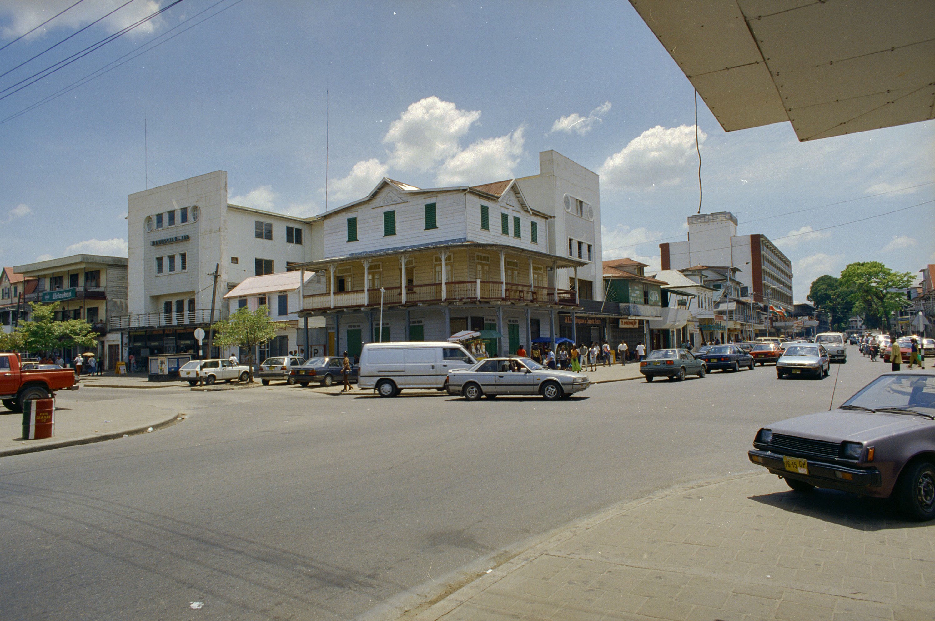 Koloniale geschiedenis: Overzicht kruispunt Domineestraat hoek Jodenbreestraat met Domineestraat 23 op voorgrond (opmerking: Suriname Reis Loek Tangel)